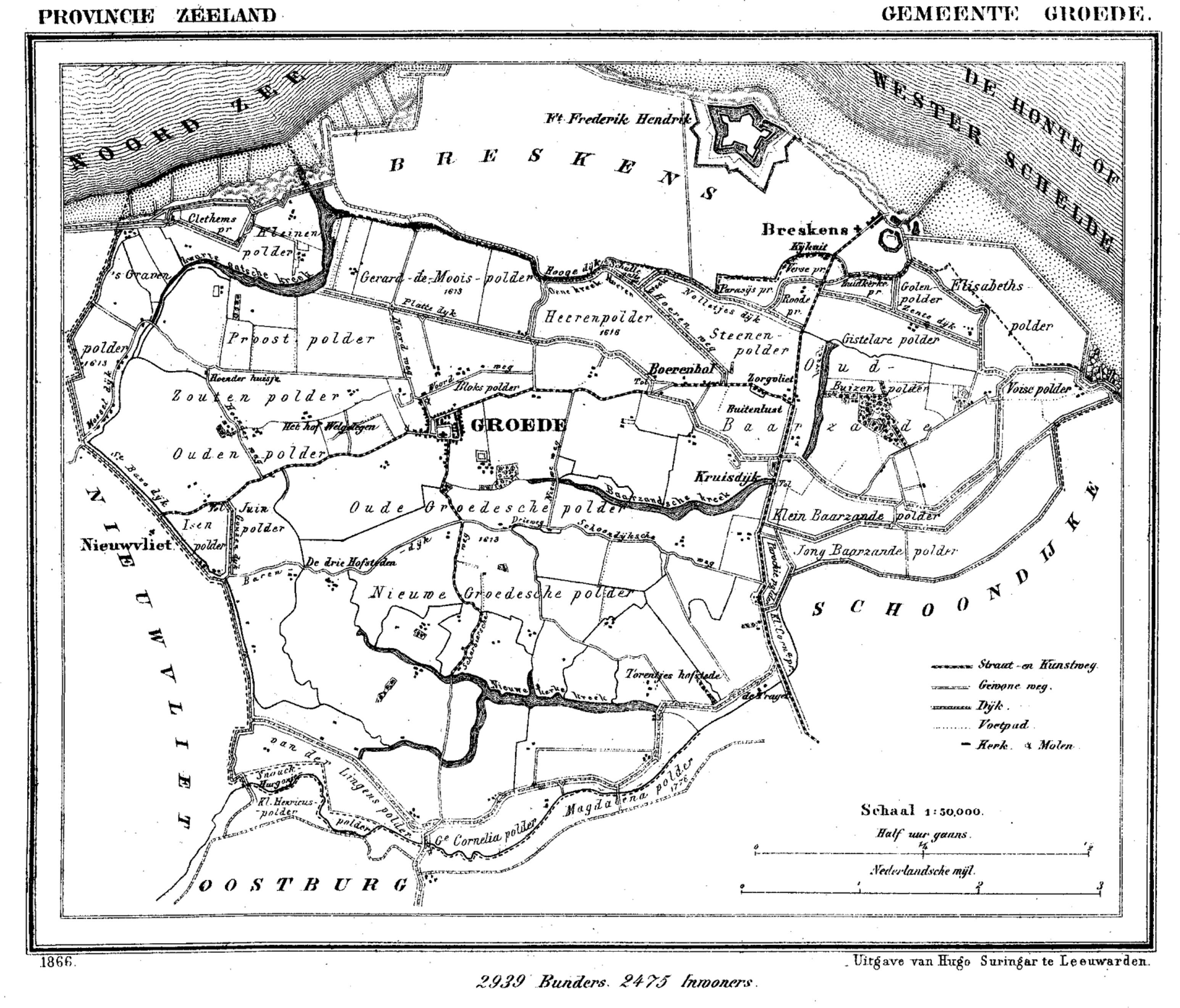 Gemeente Groede, Zeeland, Nederland